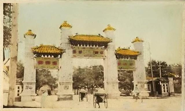 1930年前後，东公生门“履中”牌楼下的人力车（东公安街北口北向），长安左门外，可见皇城南墙。牌楼下部四柱上的标语是“誓雪國恥”。